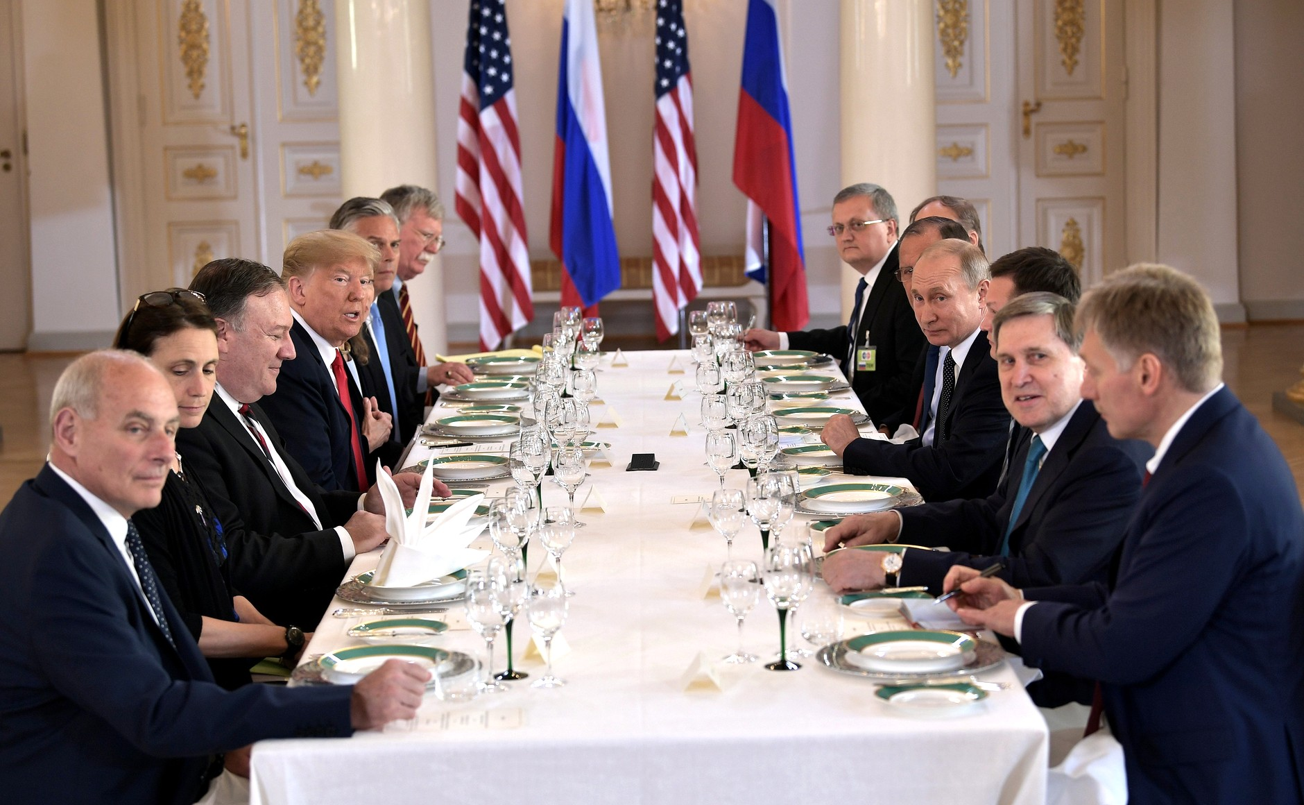 Российско-американские переговоры с участием членов делегаций в формате рабочего завтрака.